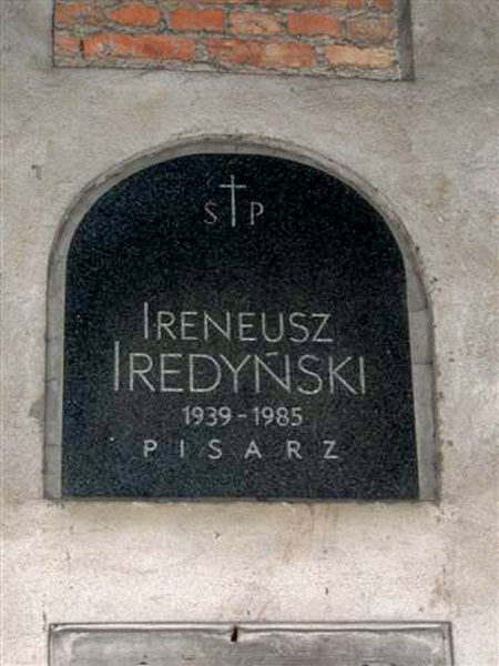 Ireneusz Iredyński's monument (Powązki Cemetery)